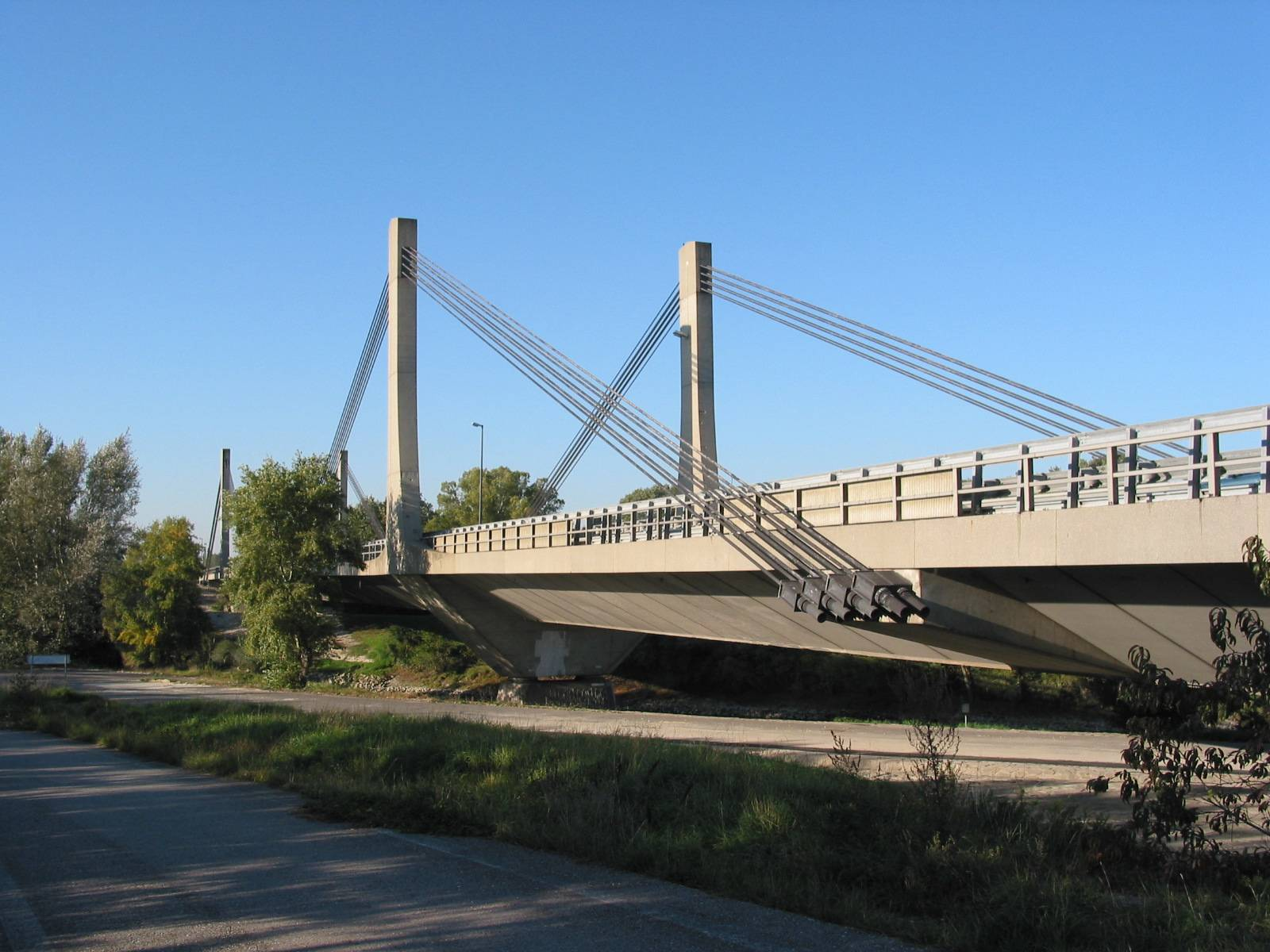 de: Schrägseilbrücke der Ost Autobahn über den Donaukanal Wien en: Cable stayed bridge of Ostautobahn, Vienna